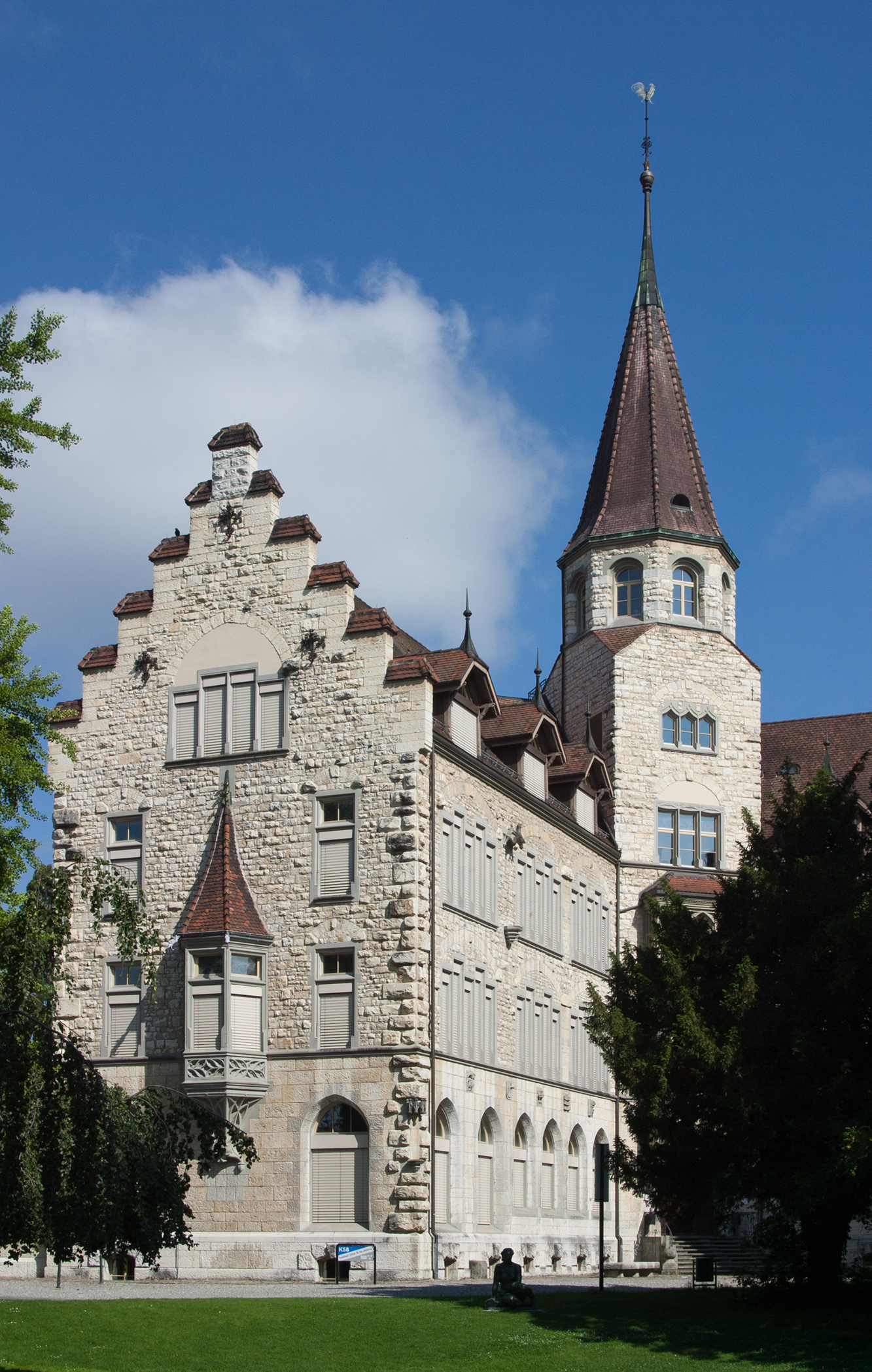 Alte Kantonsschule in Aarau